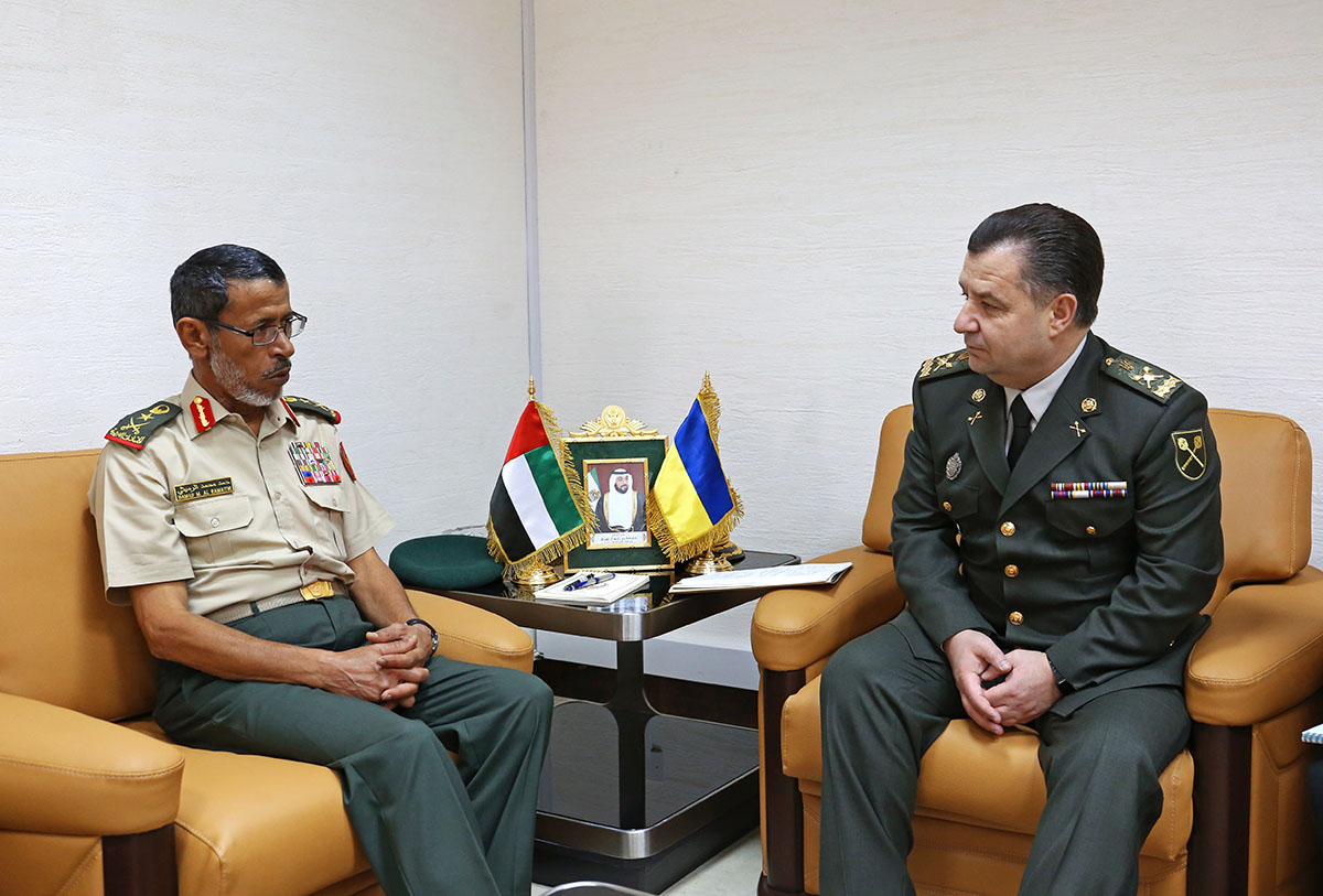 24 листопада, в рамках візиту до Об’єднаних Арабських Еміратів Міністр оборони України генерал армії України Степан Полторак провів зустріч з начальником Генерального штабу Збройних сил Об’єднаних Арабських Еміратів генерал-лейтенантом Тані аль-Румейсі.